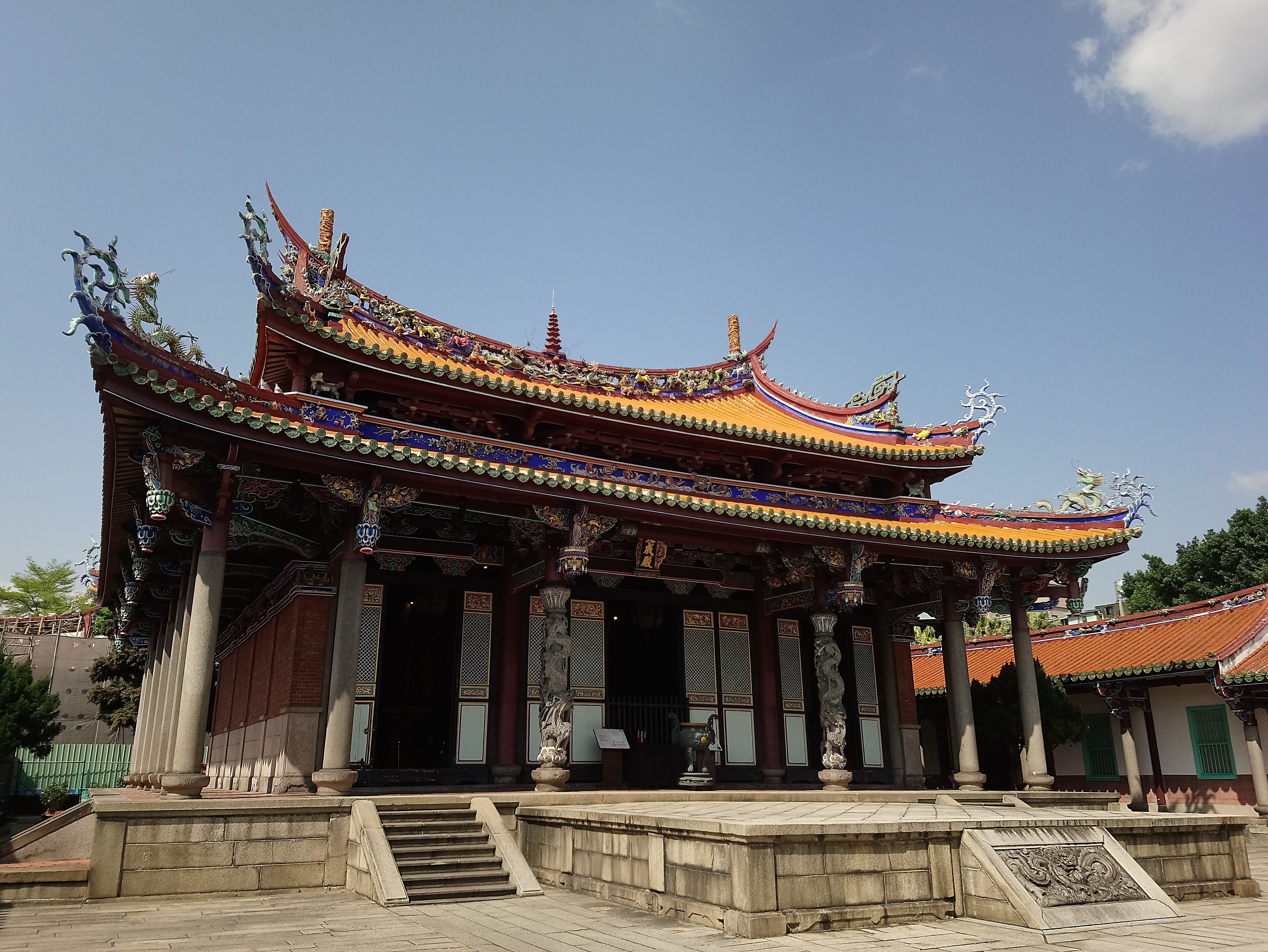 臺北孔子廟大成殿,臺北市大同區大龍次分區保安里